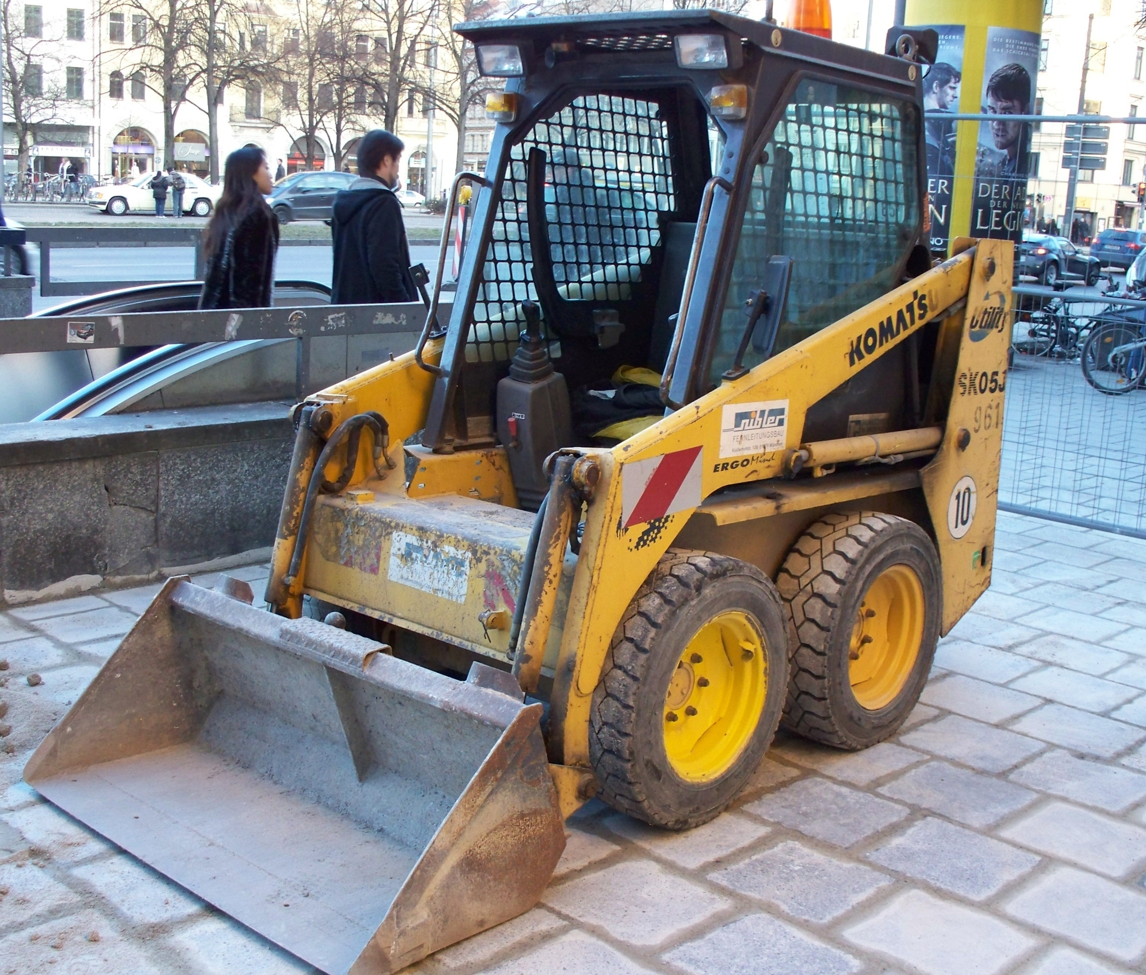 Ein Komatsu SK 05 J Skid steer loader.